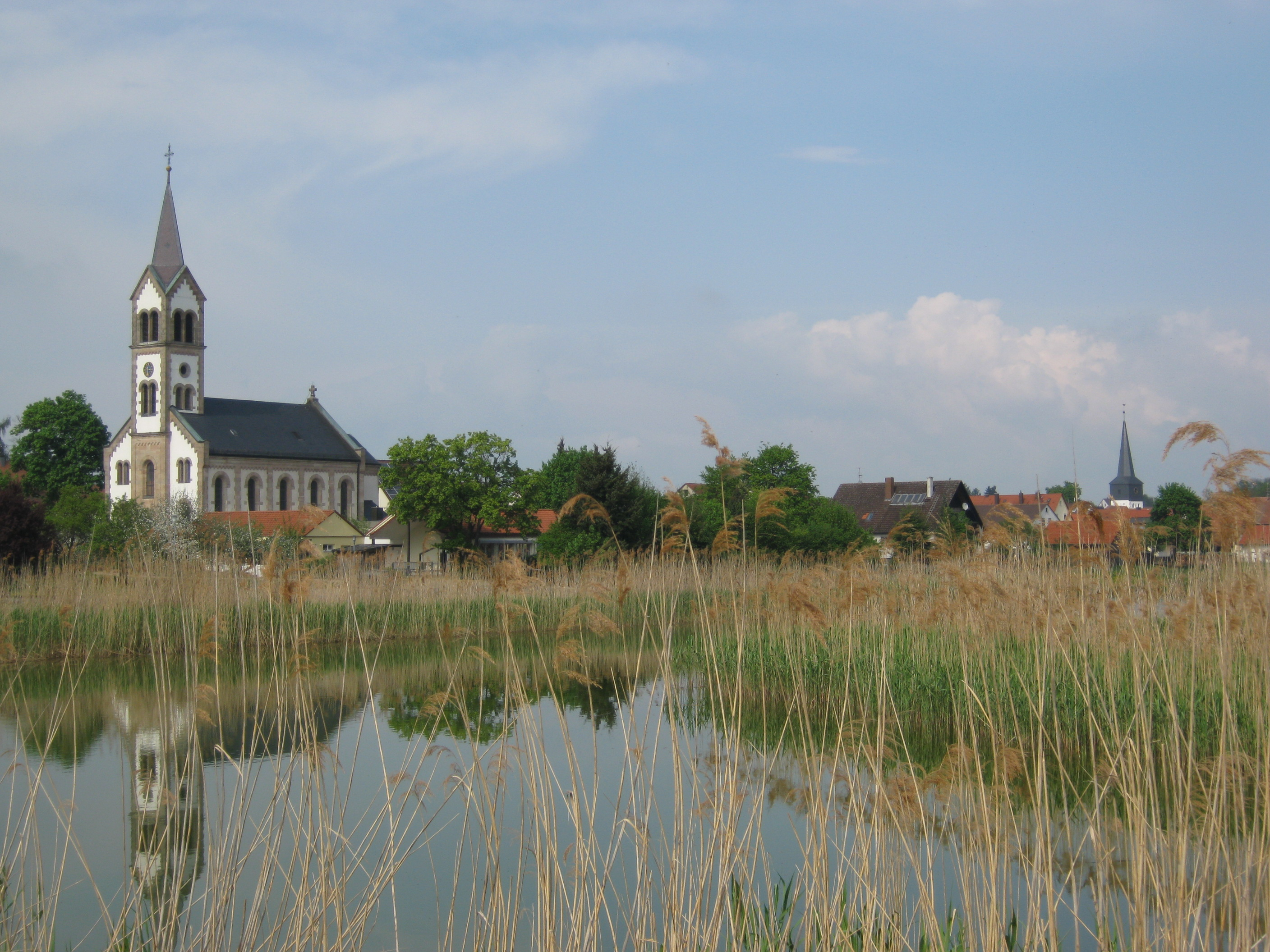 Blick auf das mittelfränkische Weisendorf mit katholischer und evangelischer Kirche